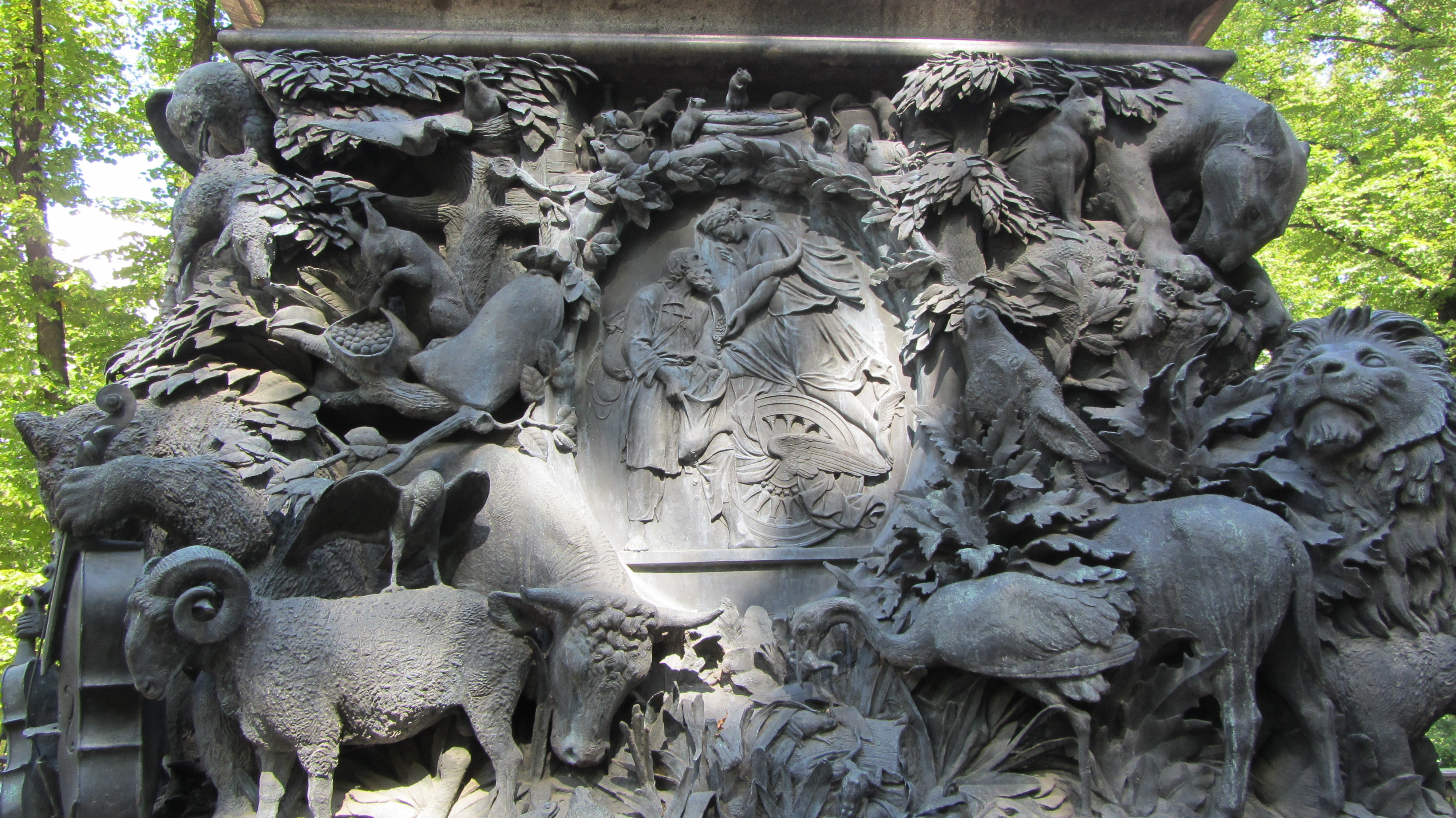 Памятник баснописцу Крылову И. А.: Дворцовая набережная, Набережная Лебяжьего канала, р. Фантанки набережная, набережная р. Мойки, Центральный район, Санкт-Петербург